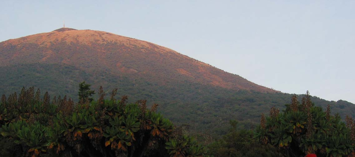 Mount Karisimbi, Rwanda